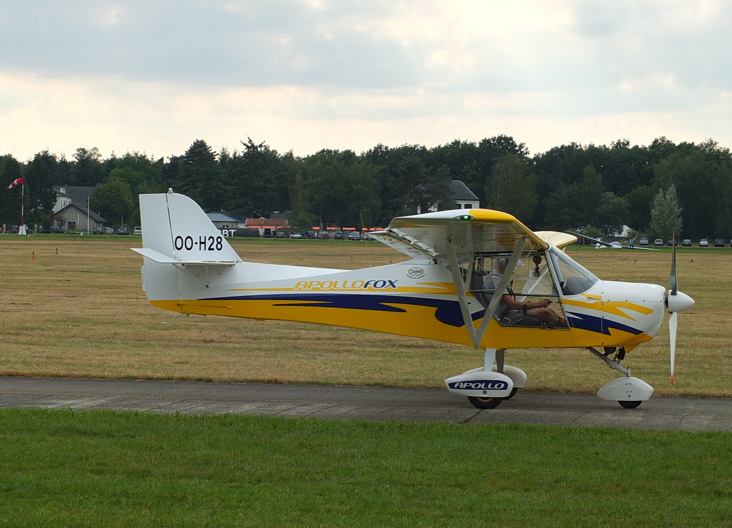 Apollo Fox OO-H28 (c/n FR300410) op het Brasschaat Flying Festival